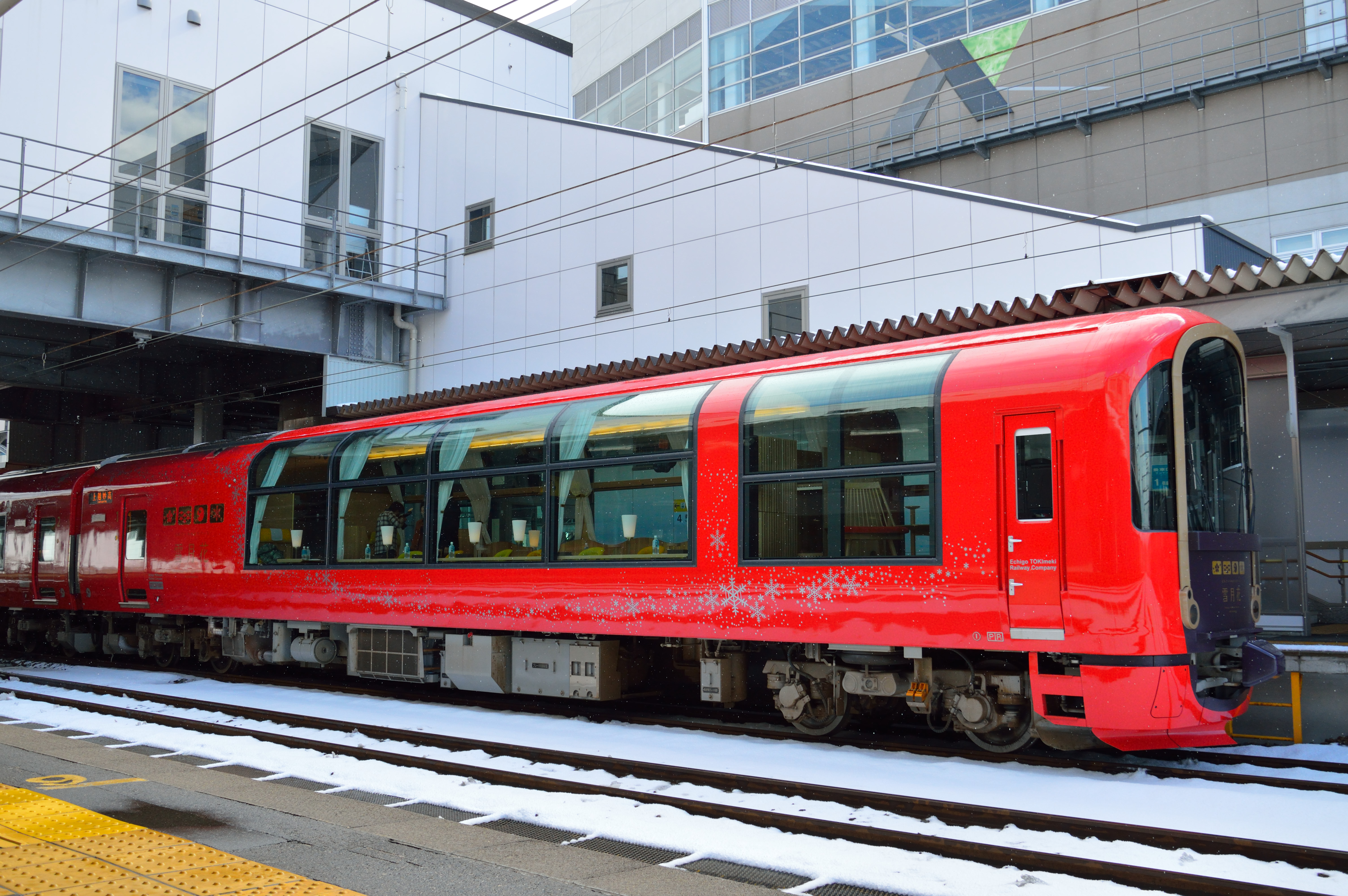 えちごトキめき鉄道ET122-1001（糸魚川駅）